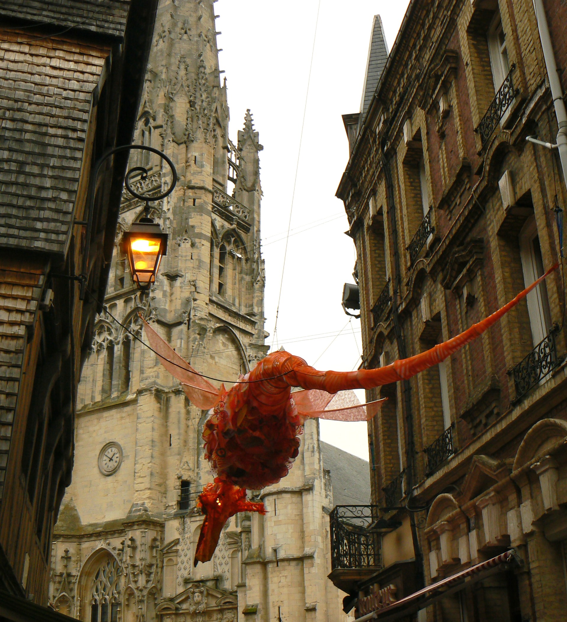 Décoration pour le fête de la scie, 2009.